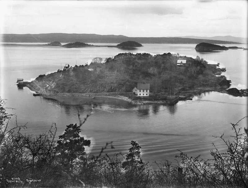 Sjursøya island in Oslo, Norway